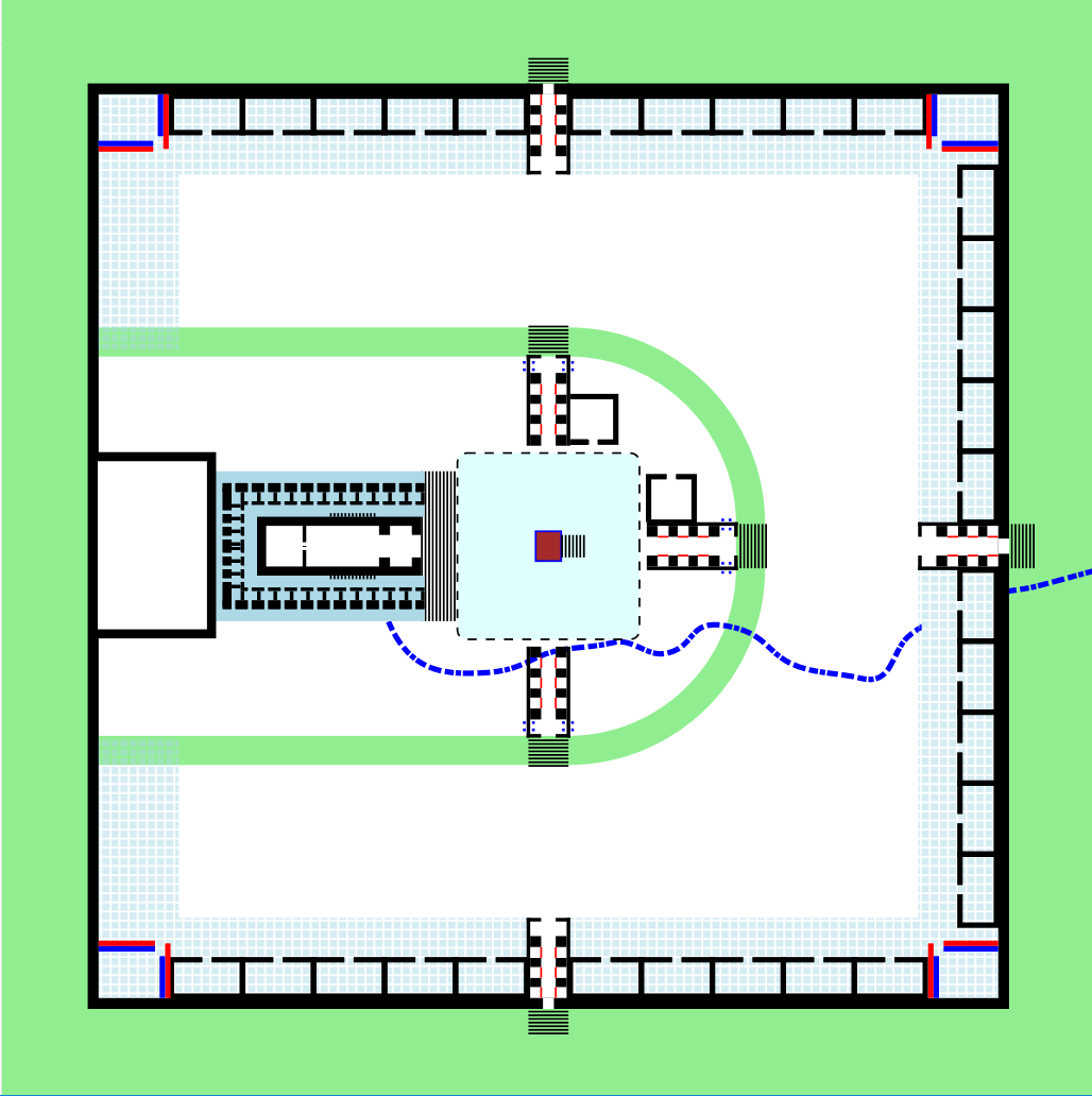 png-versie van Tempel Ezechiel.svg